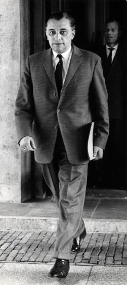 Aartsen, J. van (ARP). Kabinetsformatie 1963. Mr. van Aartsen (beoogd minister van Verkeer en Waterstaat) na zijn bezoek aan kabinetsformateur minister Marijnen. Nederland, Den Haag, 22 juli 1963.